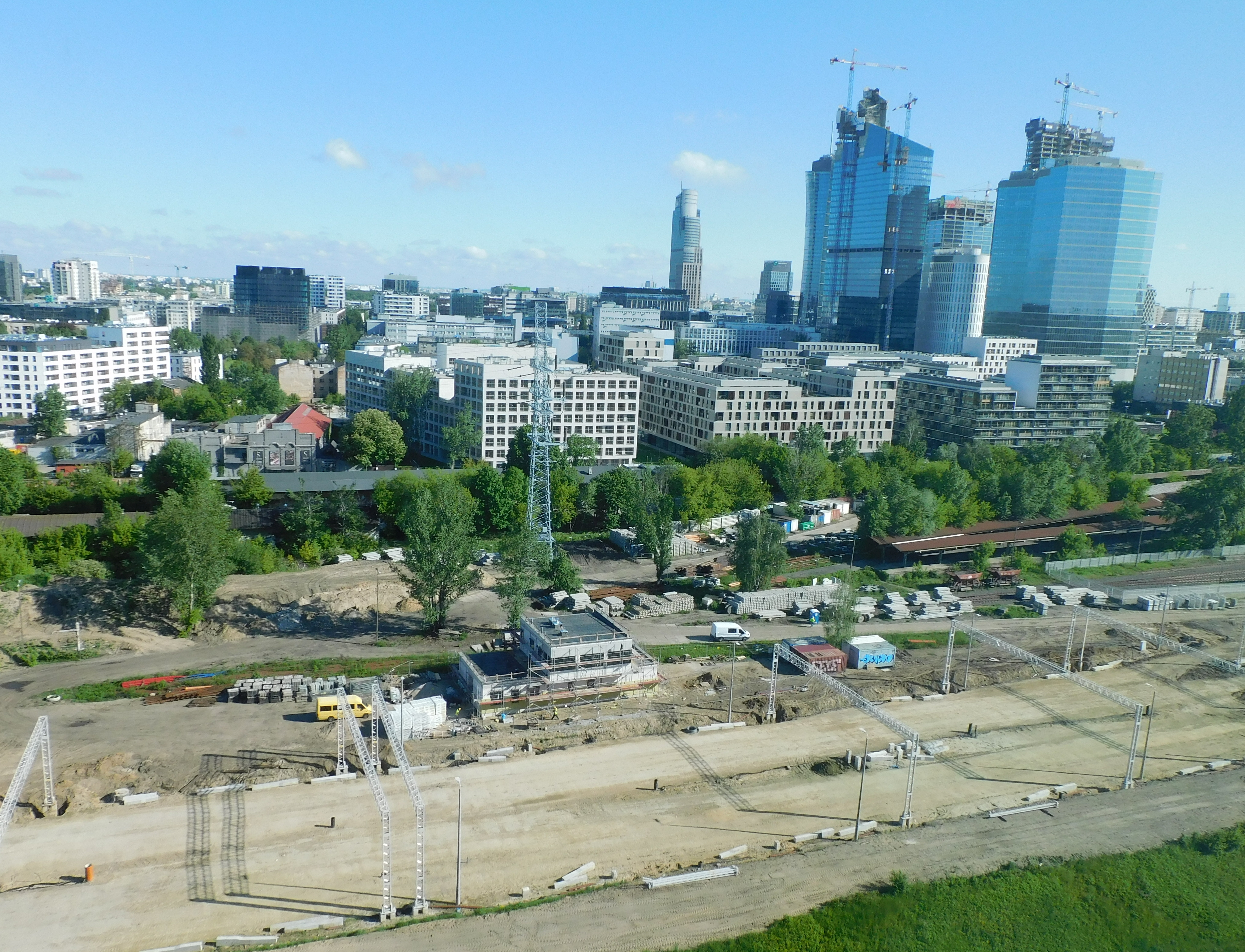 Remont stacji Warszawa Główna w 2020 r.